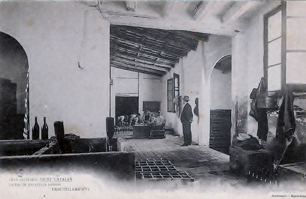 postal antiga